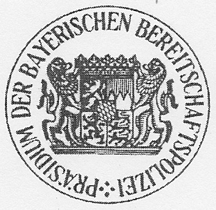 Dienstsiegel "Präsidium der Bayerischeb Bereitschaftspolizei" (Druck, 2011)